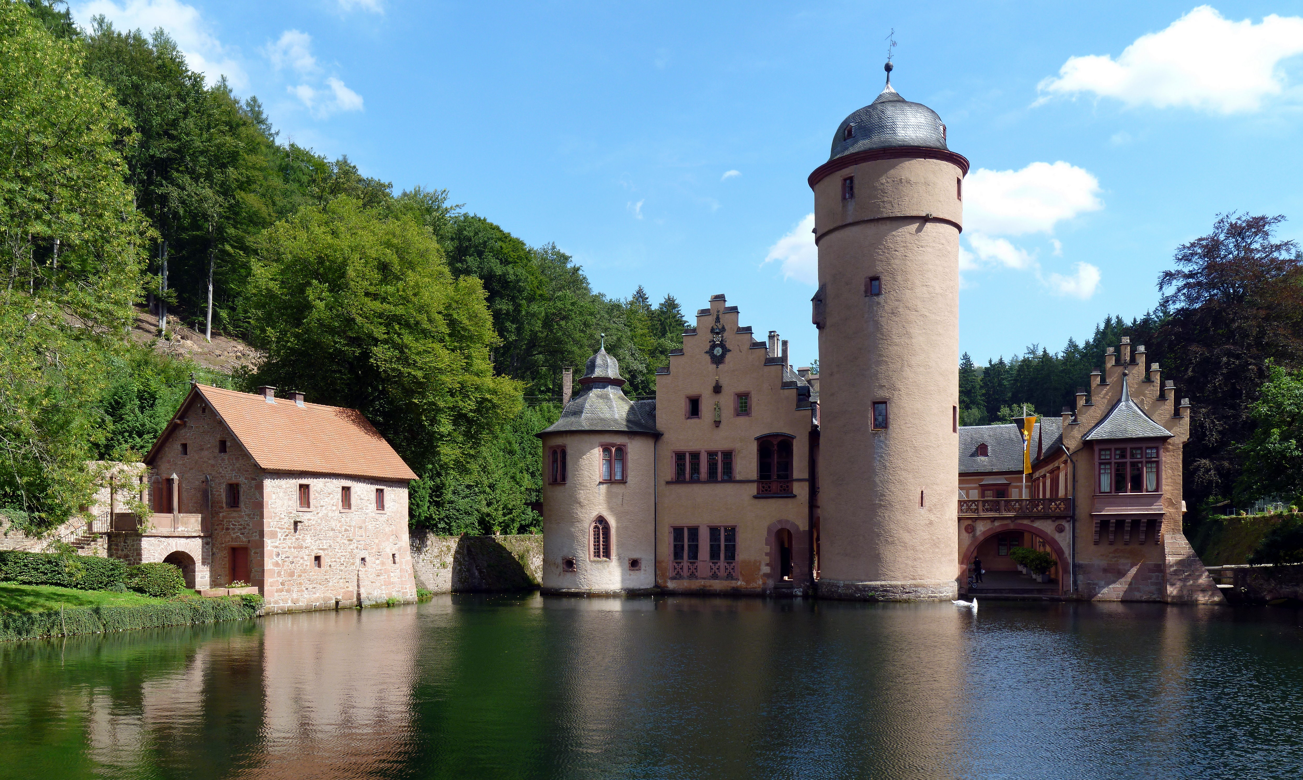 Wasserschloss Mespelbrunn